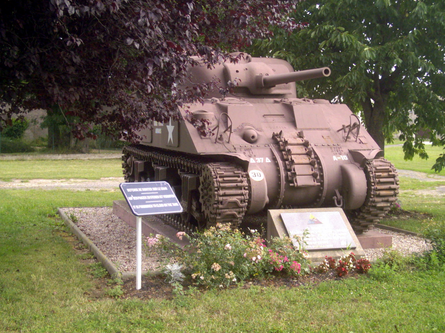 Arracourt: char M4 A4T Sherman commémorant la bataille de 1944